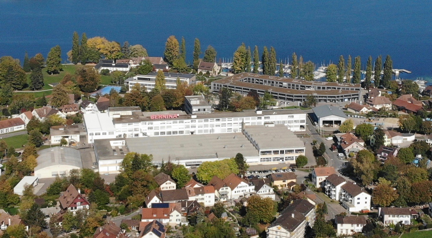 Bernina Nähmaschinenfabrik in Steckborn TG